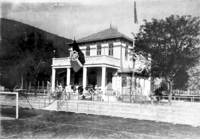 Terceira sede do Fluminense Football Club, Rio de Janeiro. Esse prédio não existe mais.